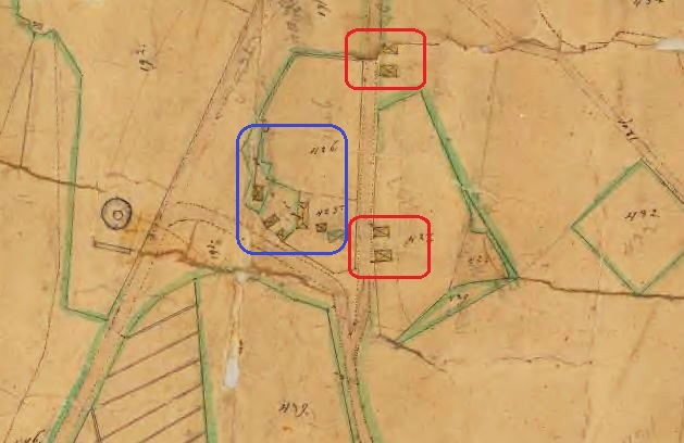 Del av karta över Övre och nedre Järva visande Ulriksdals vaktstugor (röd markering), Berglunda (blå markering)